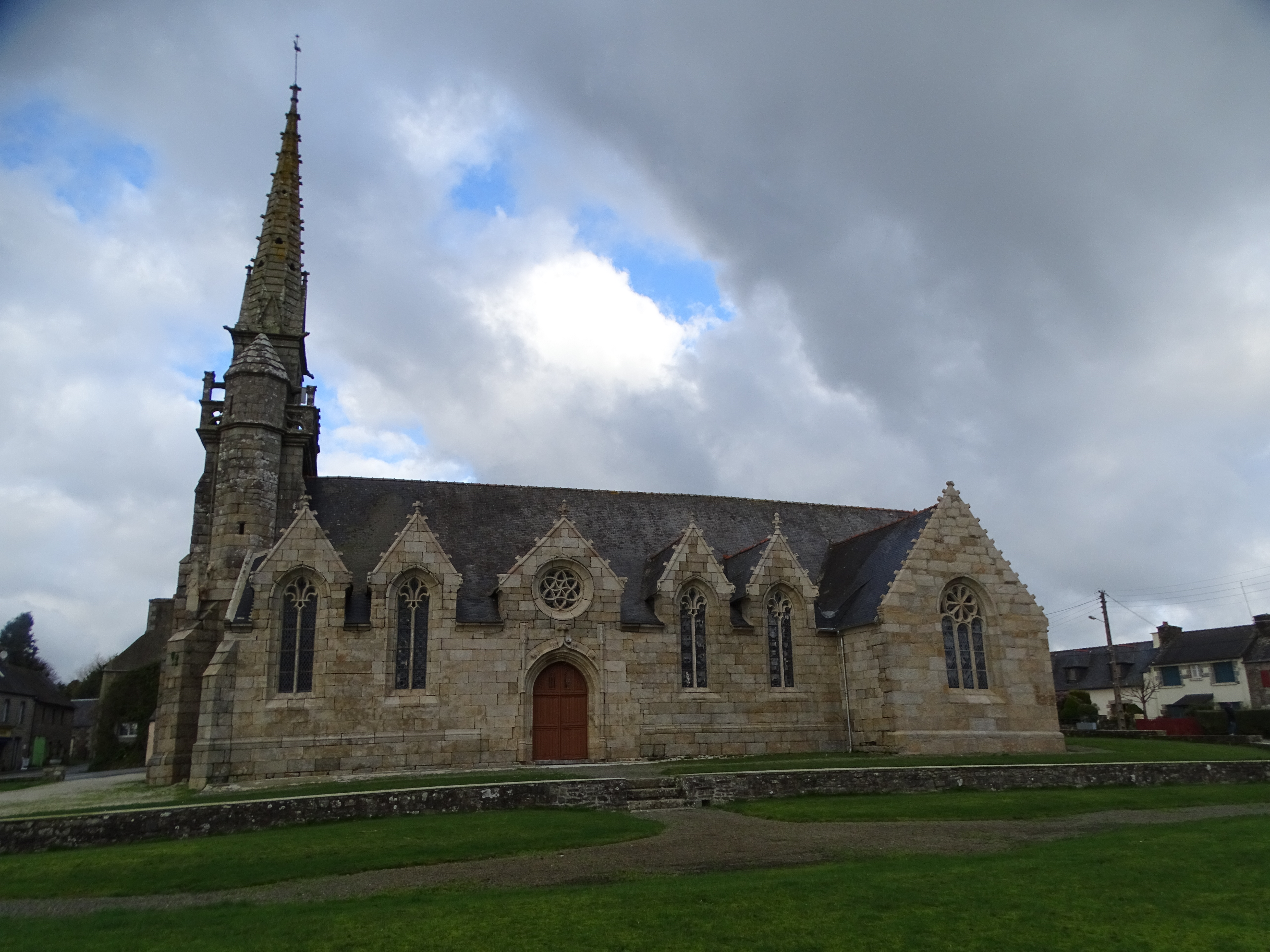 Pont-Melvez. Iliz. Talbenn en aer vat